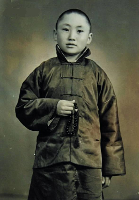 1954年摄于和布克赛里蒙古族自治区（位于新疆维吾尔自治区西北部，准噶尔盆地西北边），保存完好。作者简介：十四世夏律宛活佛（1942-），是扎萨克和雄布热斯苏木牧民托德巴音布勒格之子，原名格桑图布登伯尔勒嘉措。1949-1956年，在县王爷府寺庙念经。1957年6月-1959年，去青海省塔尔寺学习佛法。1960-1963年，在北京中央民族学院学习。后为新疆维吾尔族自治区政协常委，中国佛教协会理事、新疆佛教协会会长。